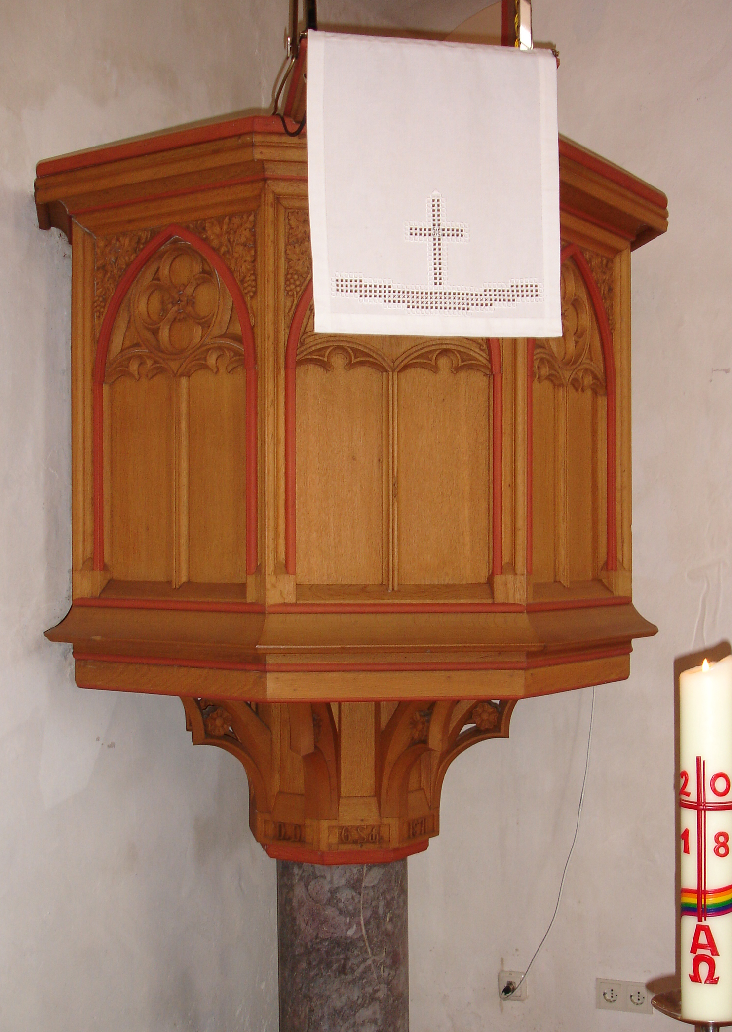 Kanzel von 1871 in der Kirche in Hohensolms